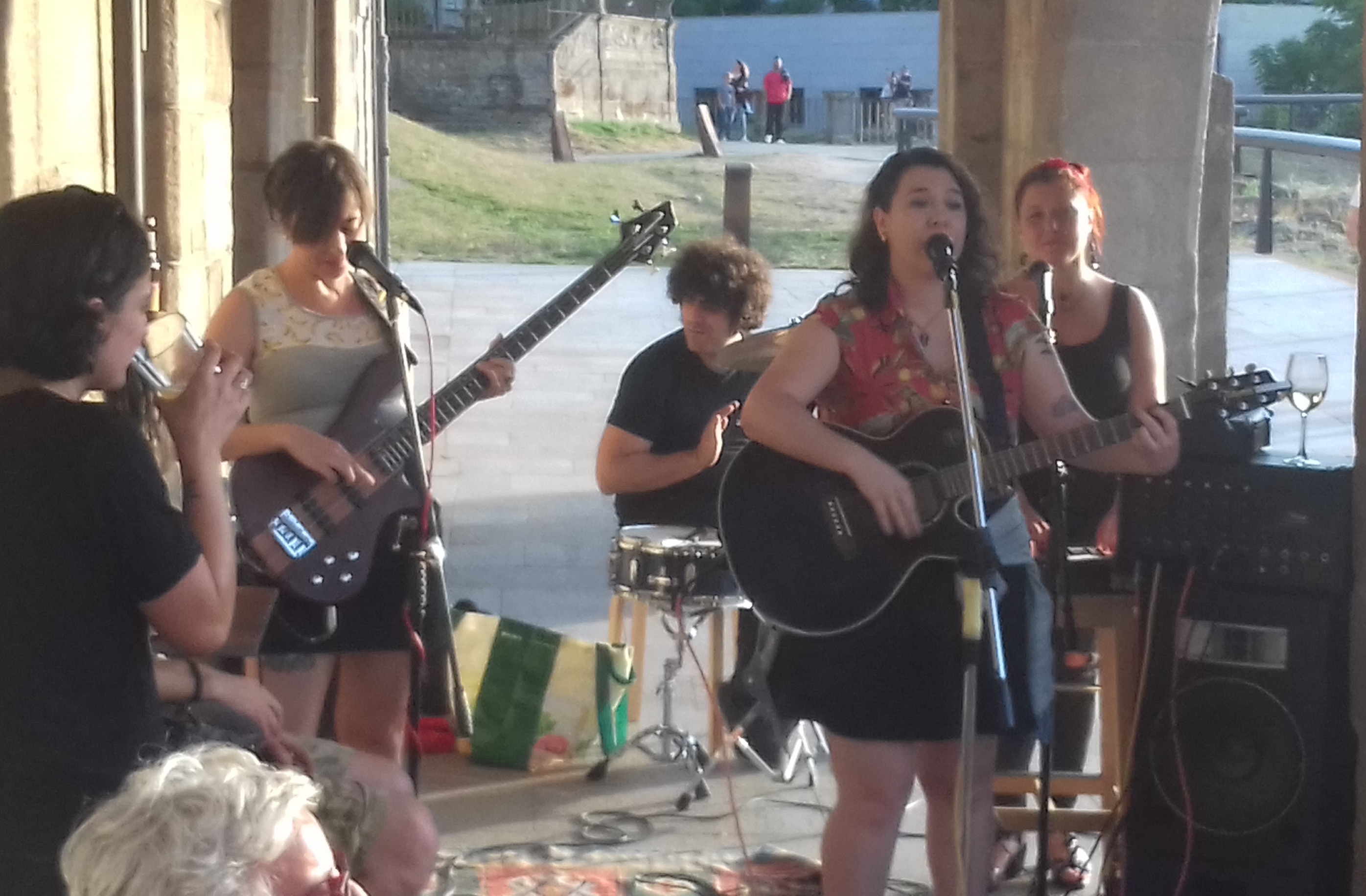 Concerto do grupo Jamonas no Campiño de Santa María, en Pontevedra